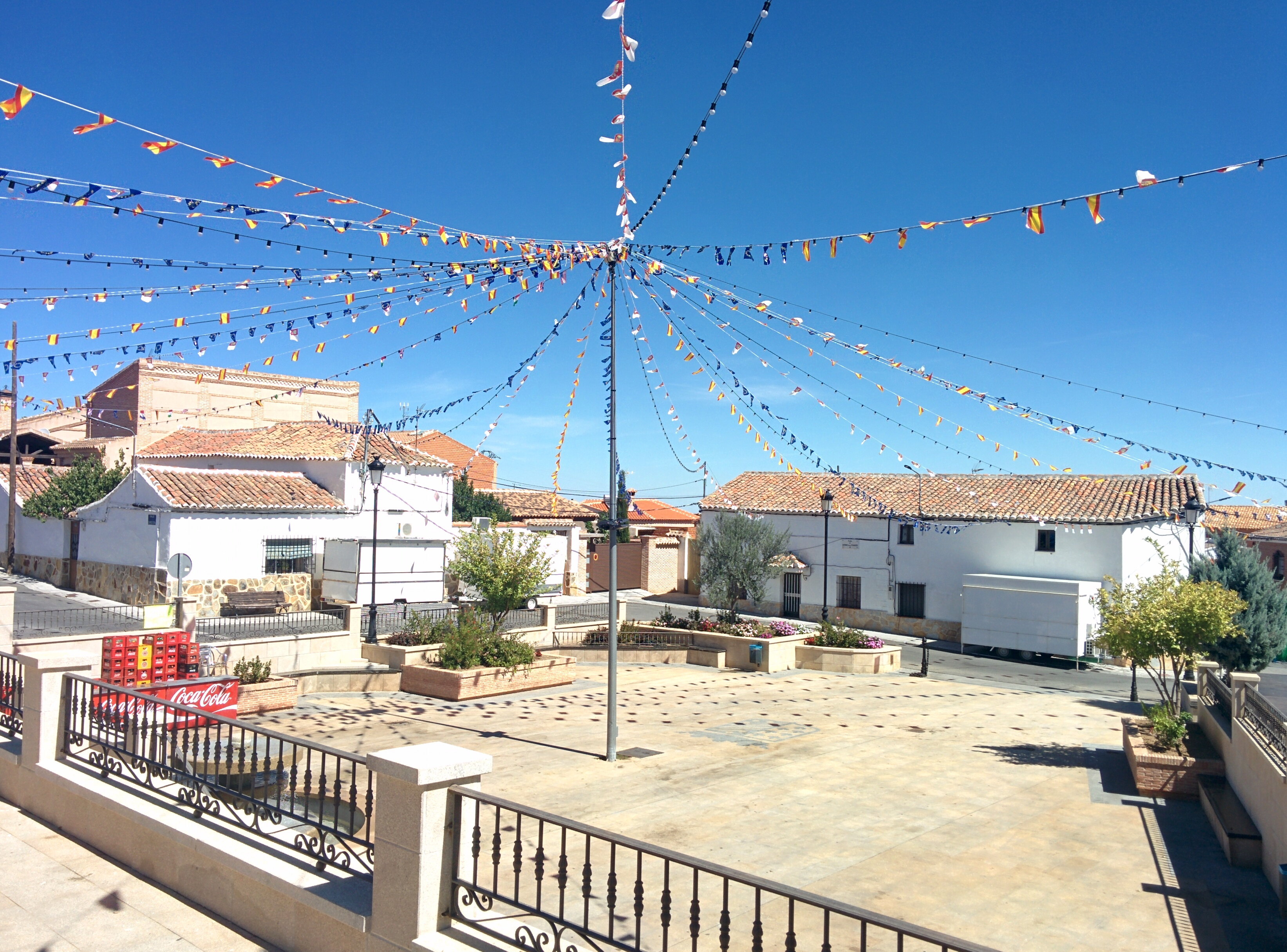 Plaza Licinio de la Fuente, en Noez (Toledo, España).